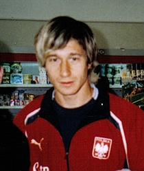 Mirosław Szymkowiak